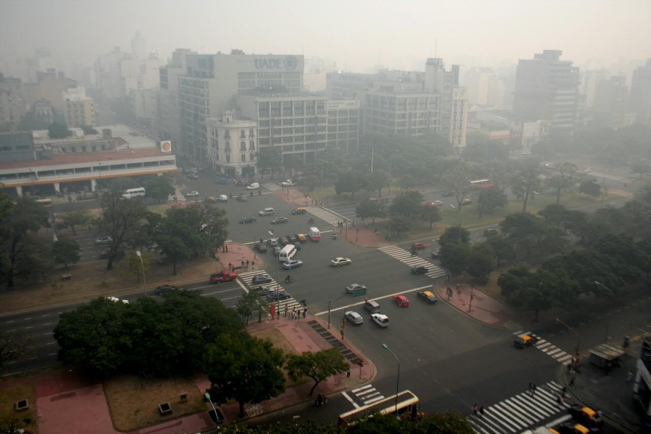 Fenómeno de concentración de humo sobre la ciudad de Buenos Aires, a mediados de abril de 2008.